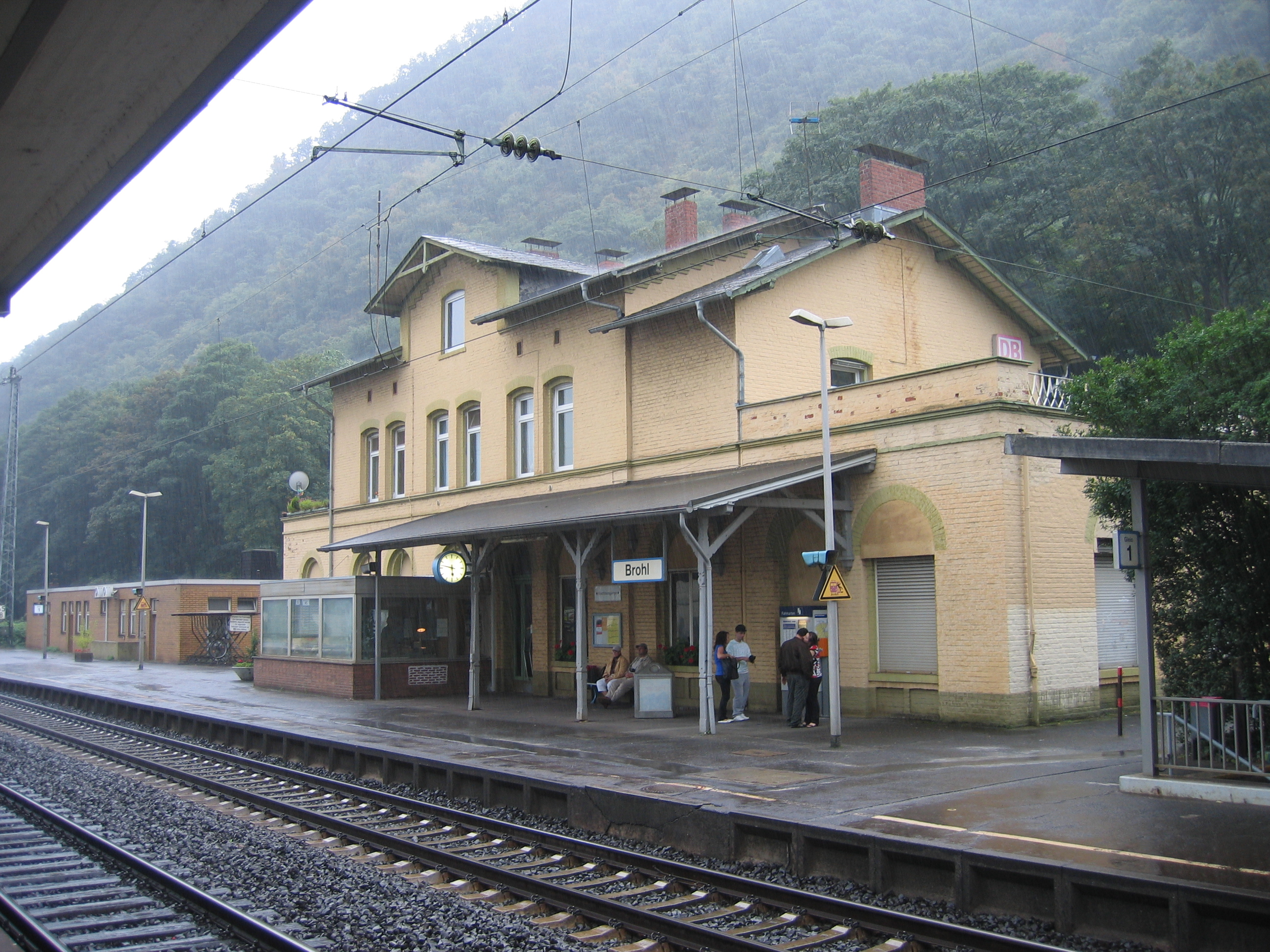 Der Bahnhof Brohl, Linke Rheinstrecke